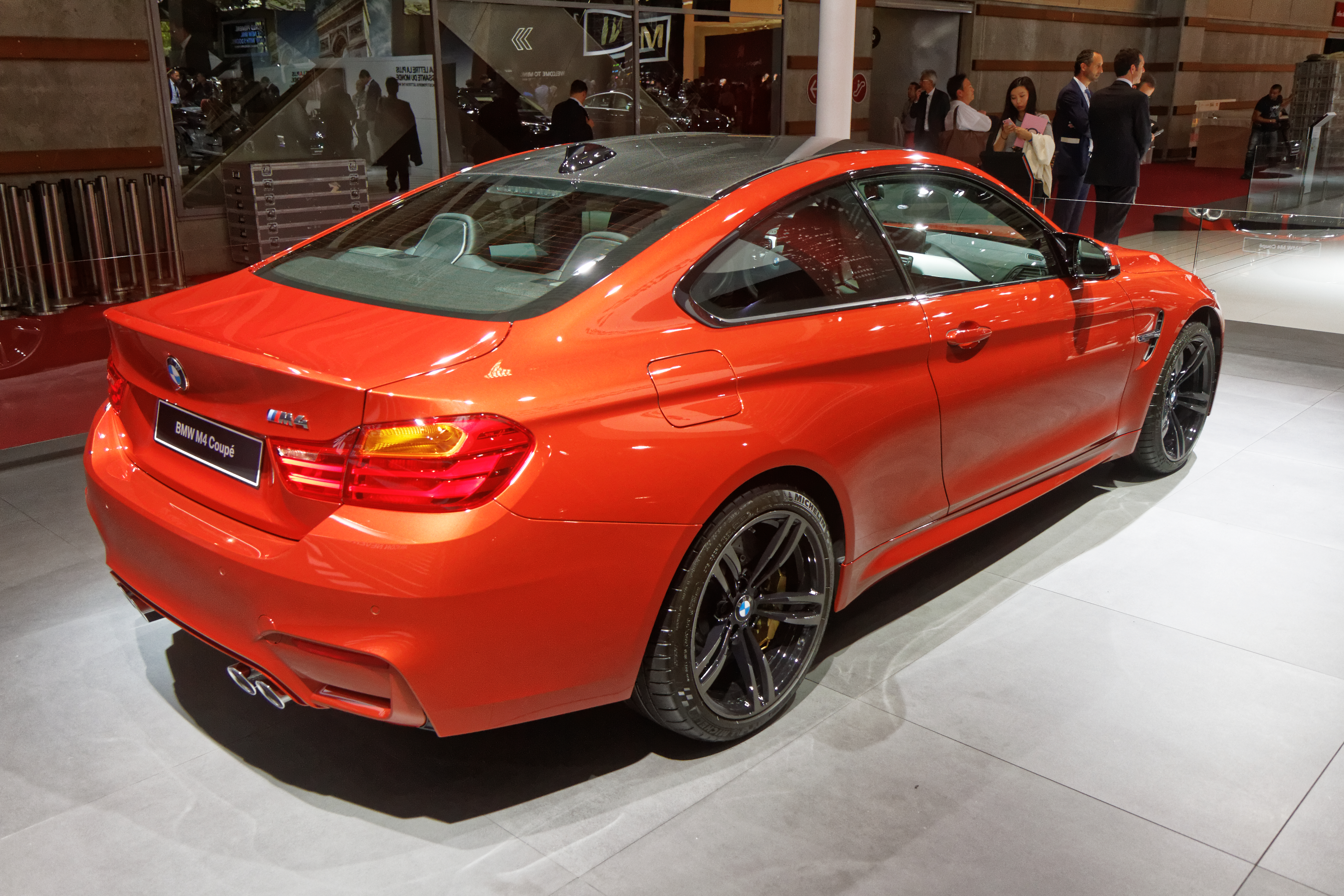 Une BMW M4 Coupé présentée lors du mondial de l'automobile de Paris 2014.